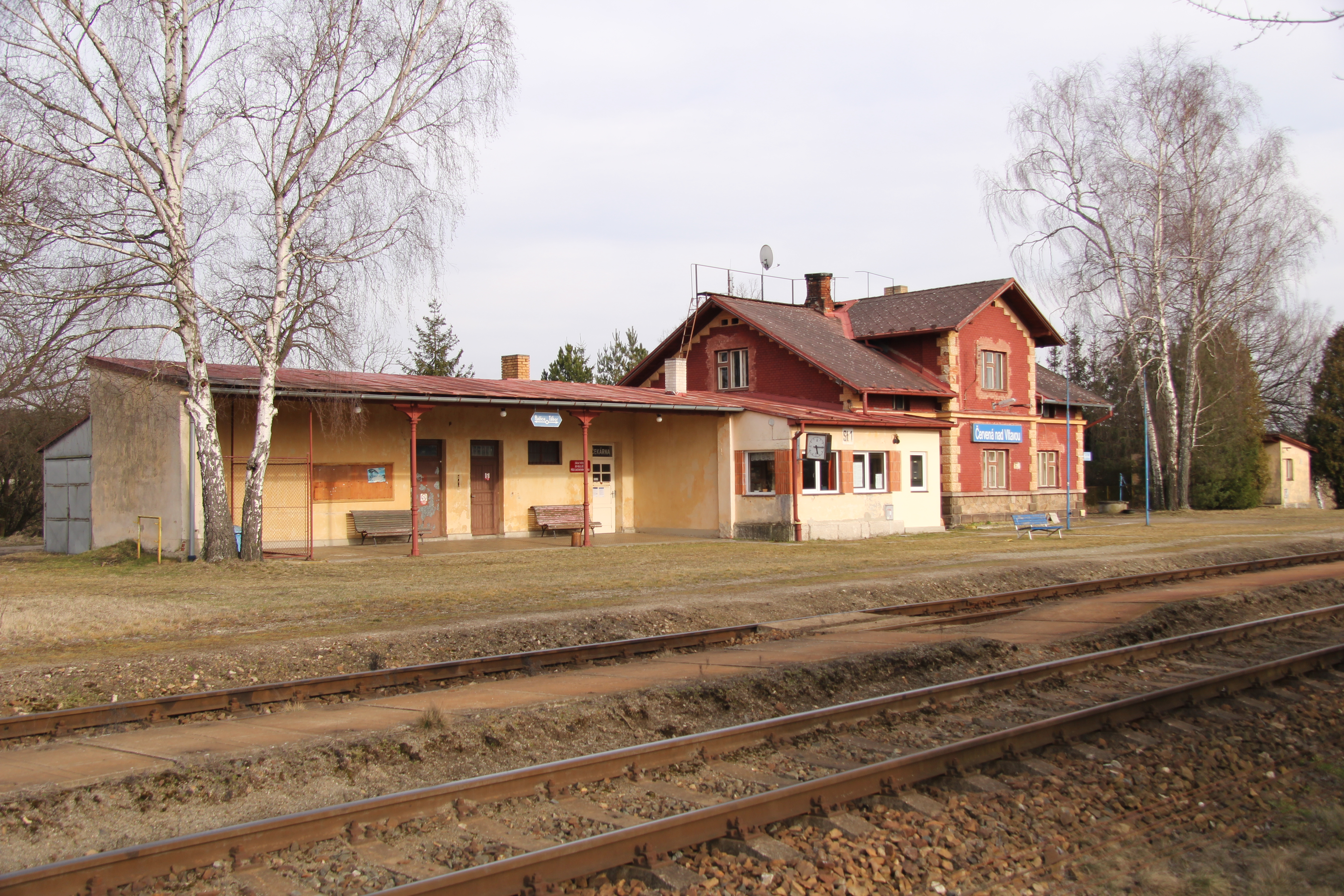 Historické železniční nádraží na Červené (2018)